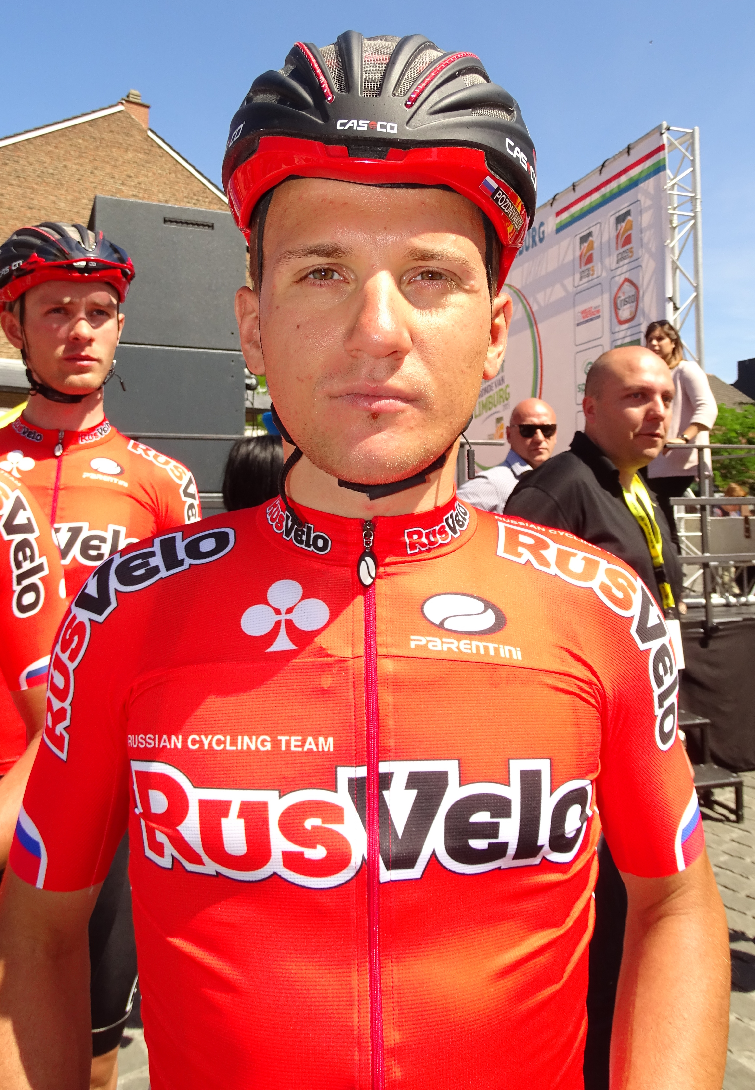 Reportage réalisé le dimanche 14 juin à l'occasion du départ et de l'arrivée du Tour du Limbourg 2015 à Tongres, Belgique.